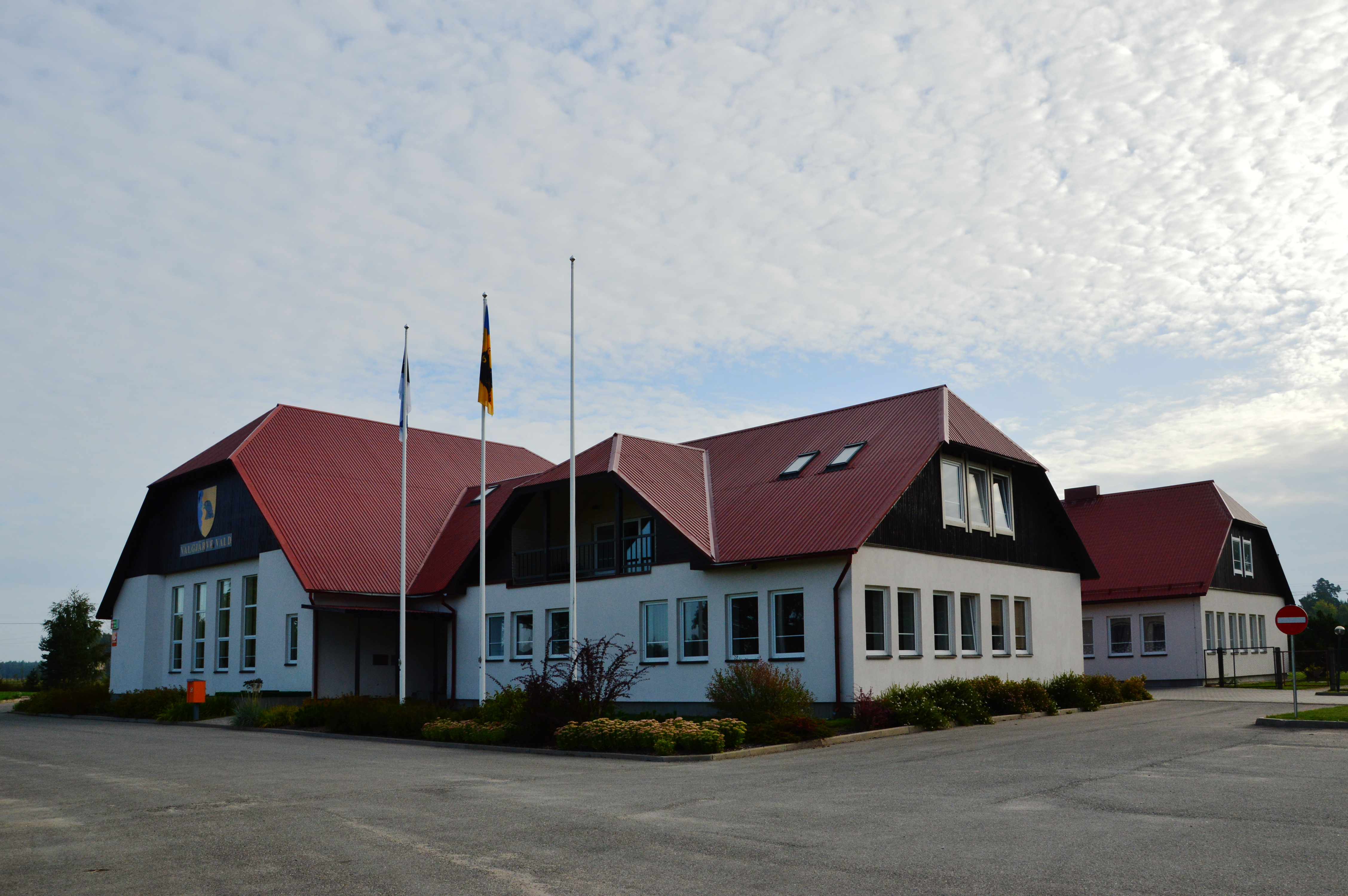 Valgjärve vallamaja